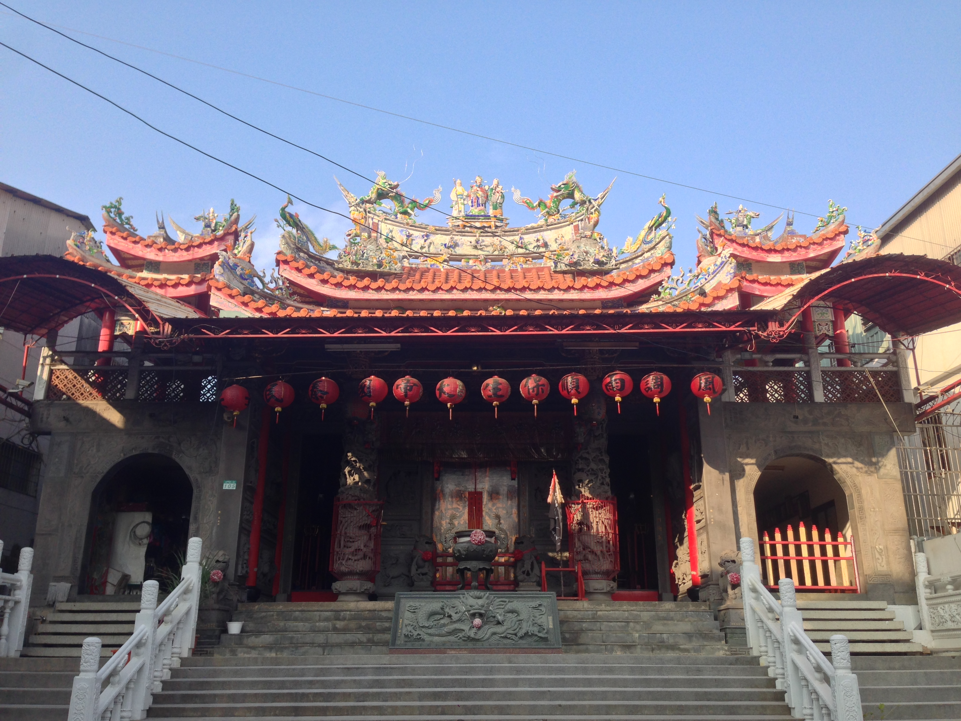 中文（台灣）: 市仔頭福隆宮